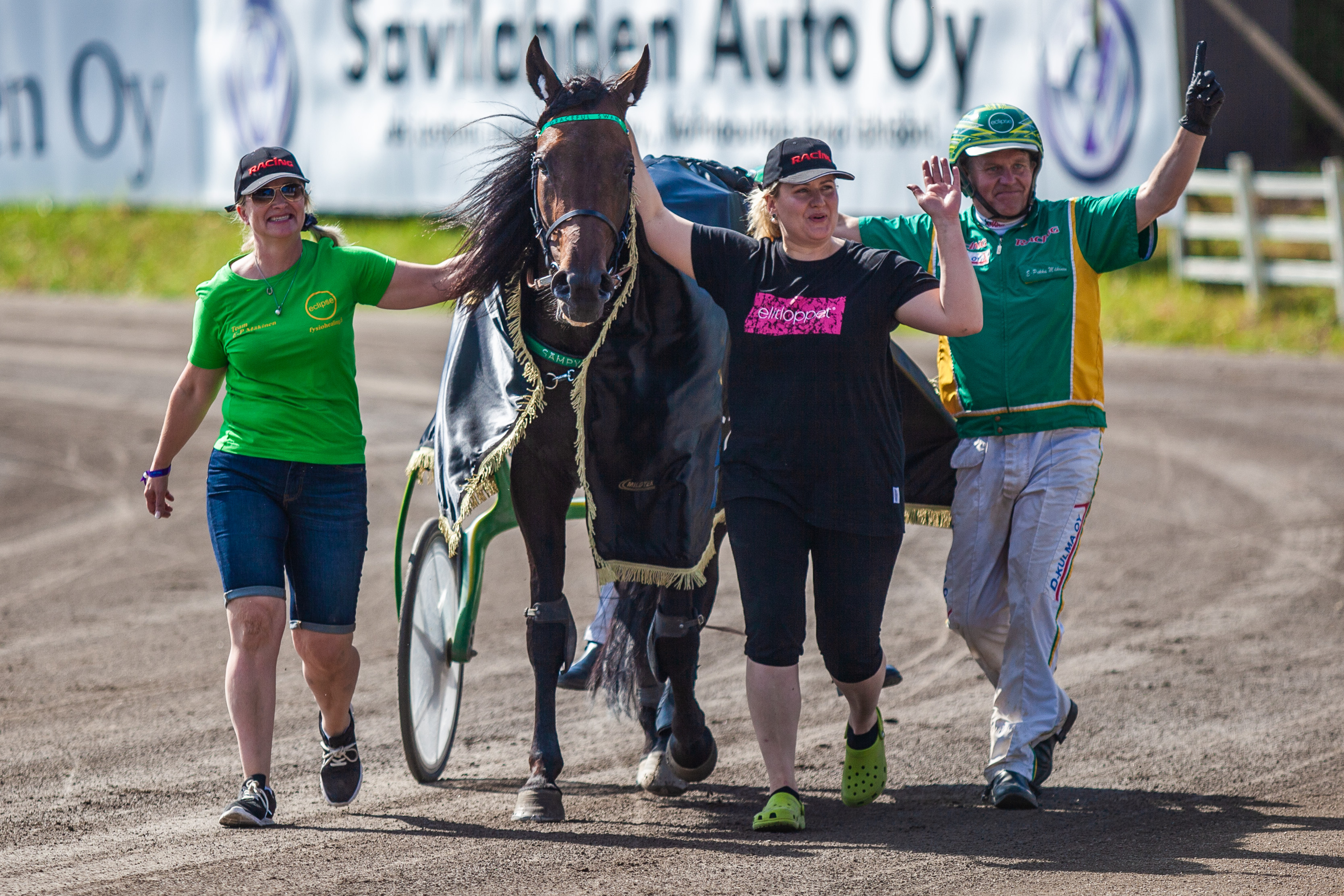 Graceful Swamp, Krista-Carola Mäkinen, Ilona Mäkinen and Erkki-Pekka Mäkinen at Mikkeli 21.7.2019